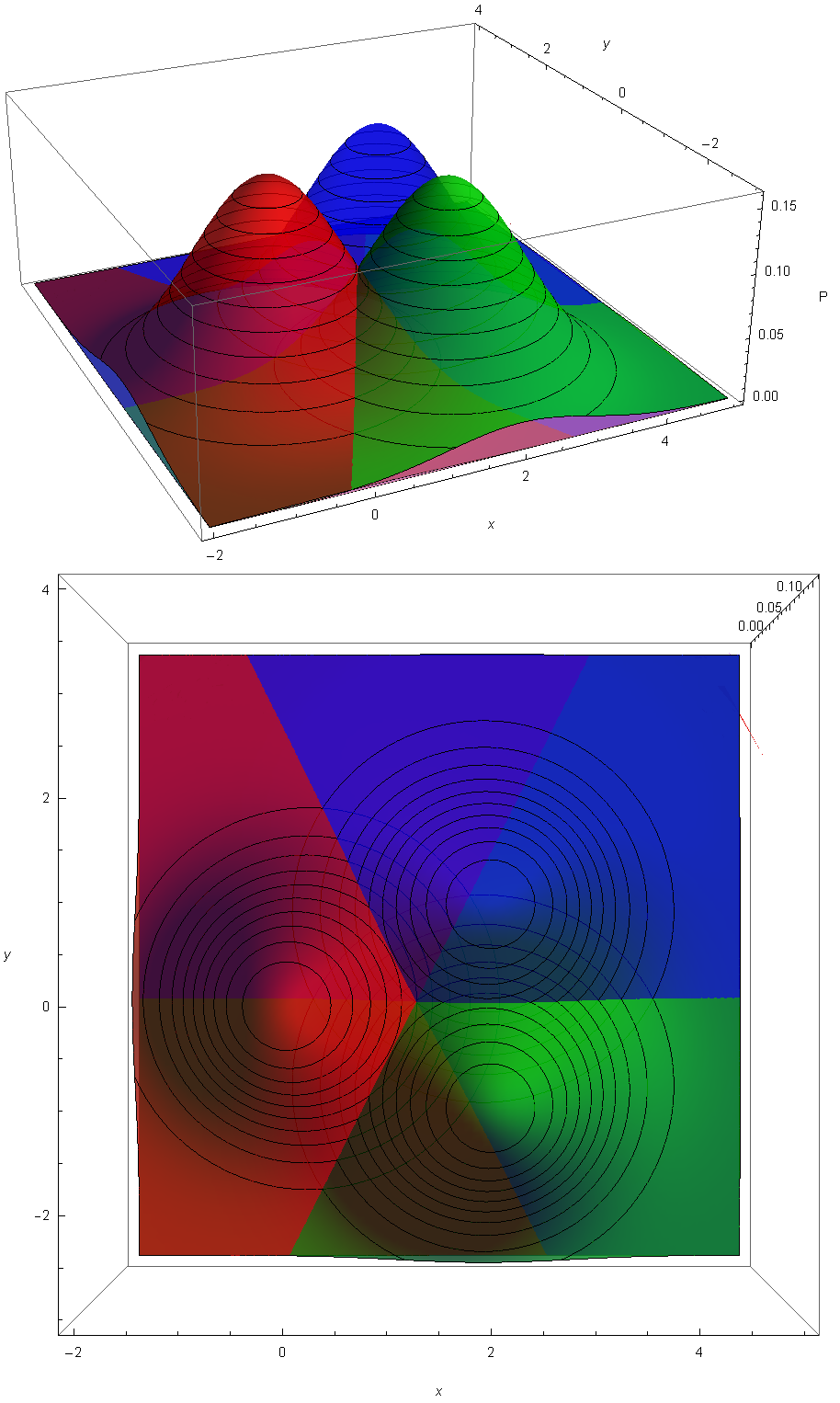 Obrázek znázorňuje hustotu tří dvourozměrných normálních rozdělení s jednotkovou varianční maticí a středními hodnotami (0,0) červená, (2,-1) zelená, (2,1) modrá.